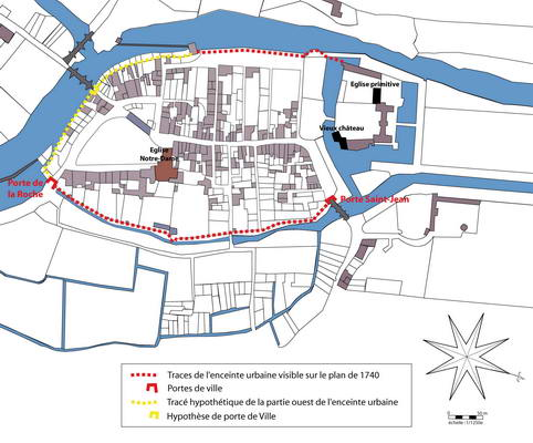 Traces de l'enceinte urbaine de Saint-Loup au Moyen Âge.